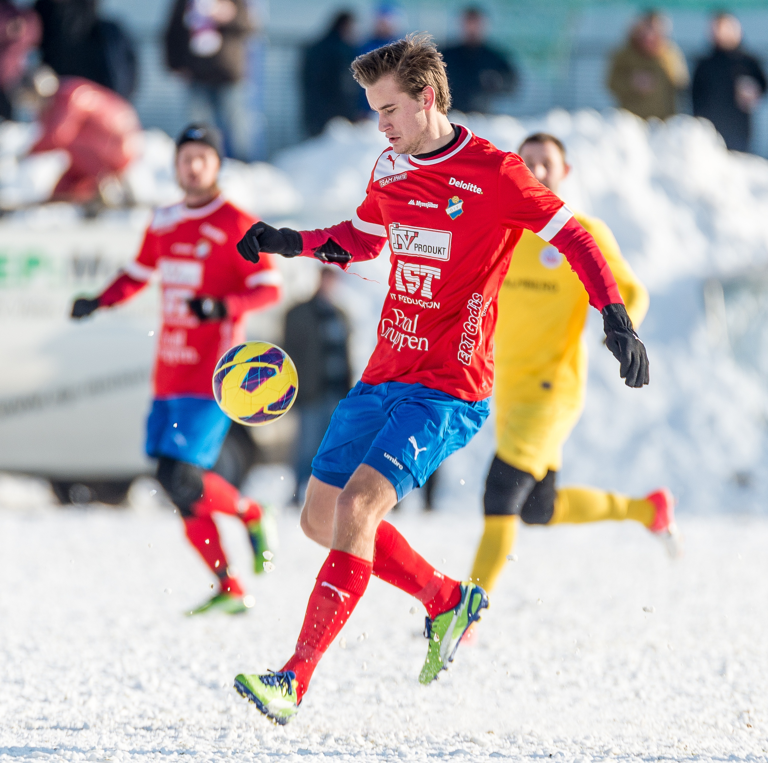 Österbacken Månz Karlsson spelar årets första träningsmatch 2013 på stenhård snöplan i Rostock, 19/1 2013.